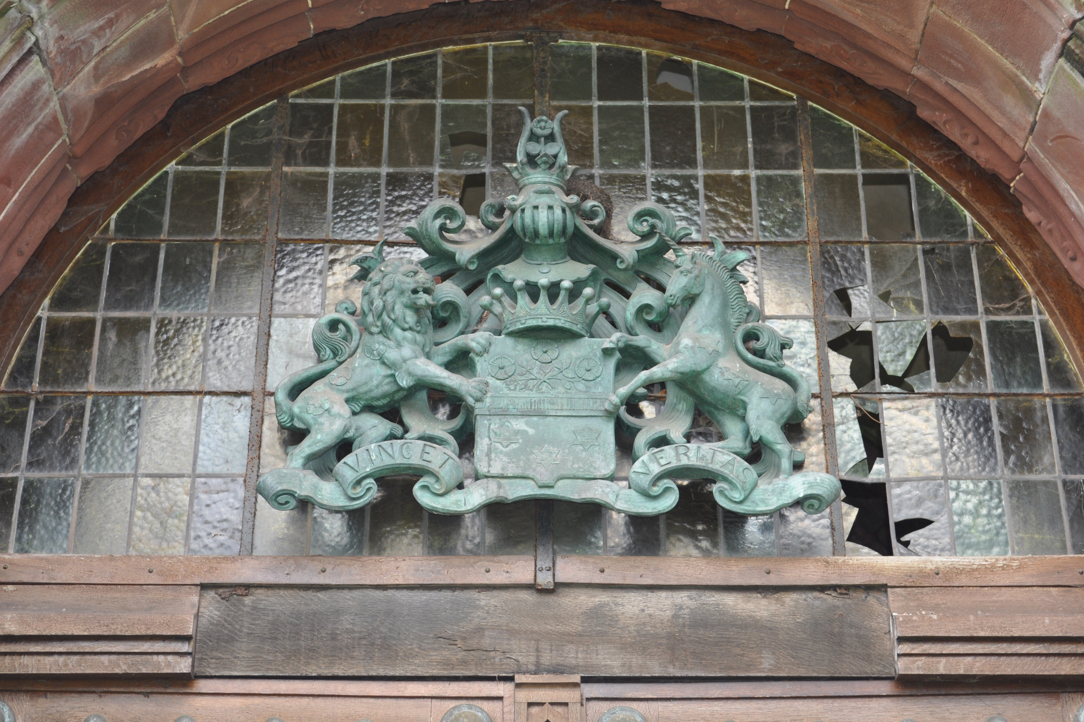 Wappen am Mausoleum von Schröder auf dem Friedhof Hamburg-Ohlsdorf.